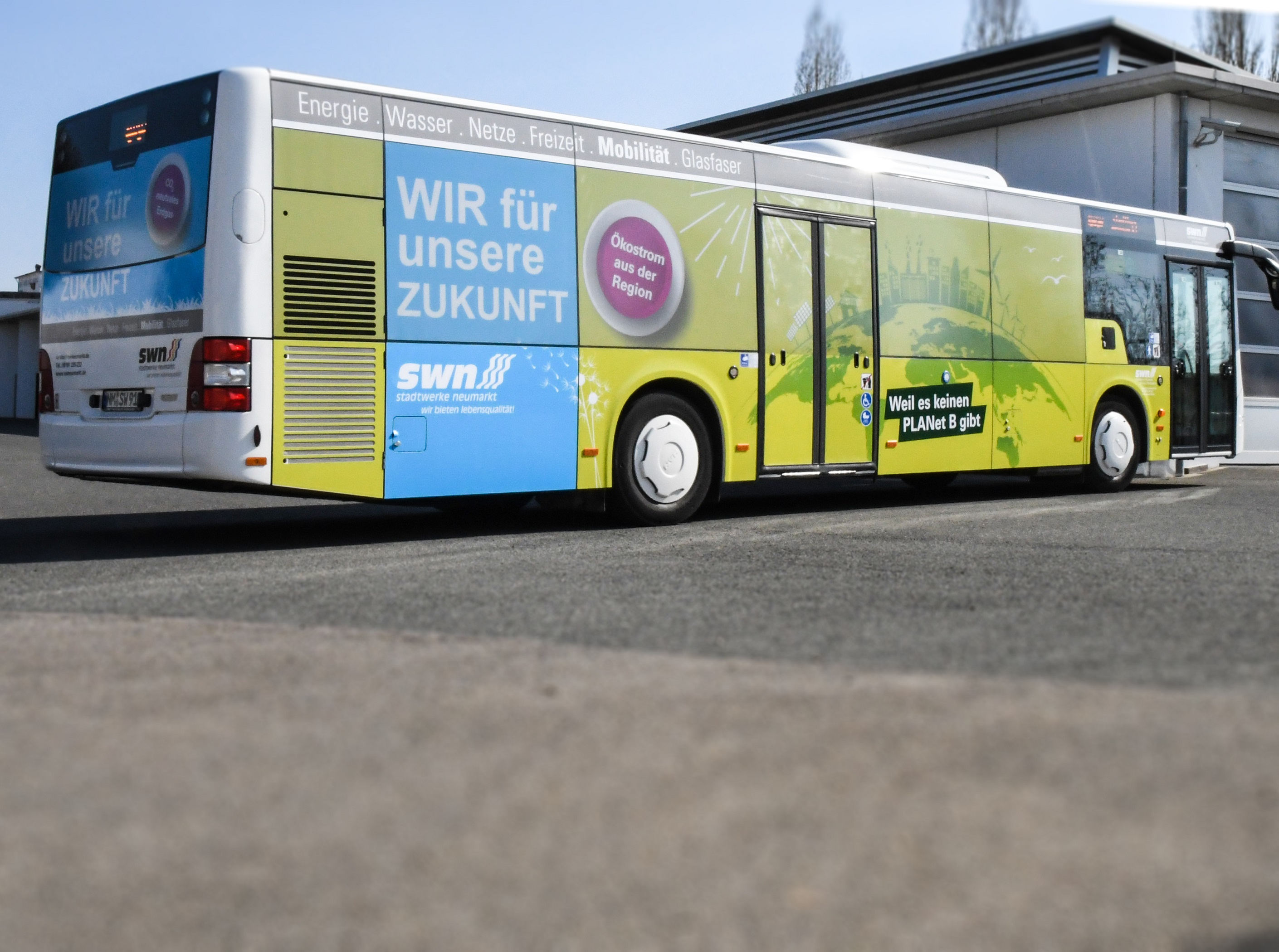 Öko Bus Stadtwerk Neumarkt zum Thema "es gibt KEINEN PLANet B"